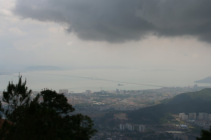 Penang Bridge. Photo Marc Cagninacci